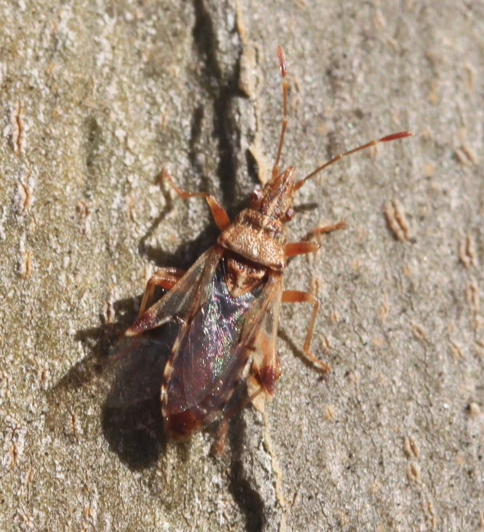 Belonochilus numenius am 16. Januar 2020 an einem Platanenstamm in Walldorf/Baden